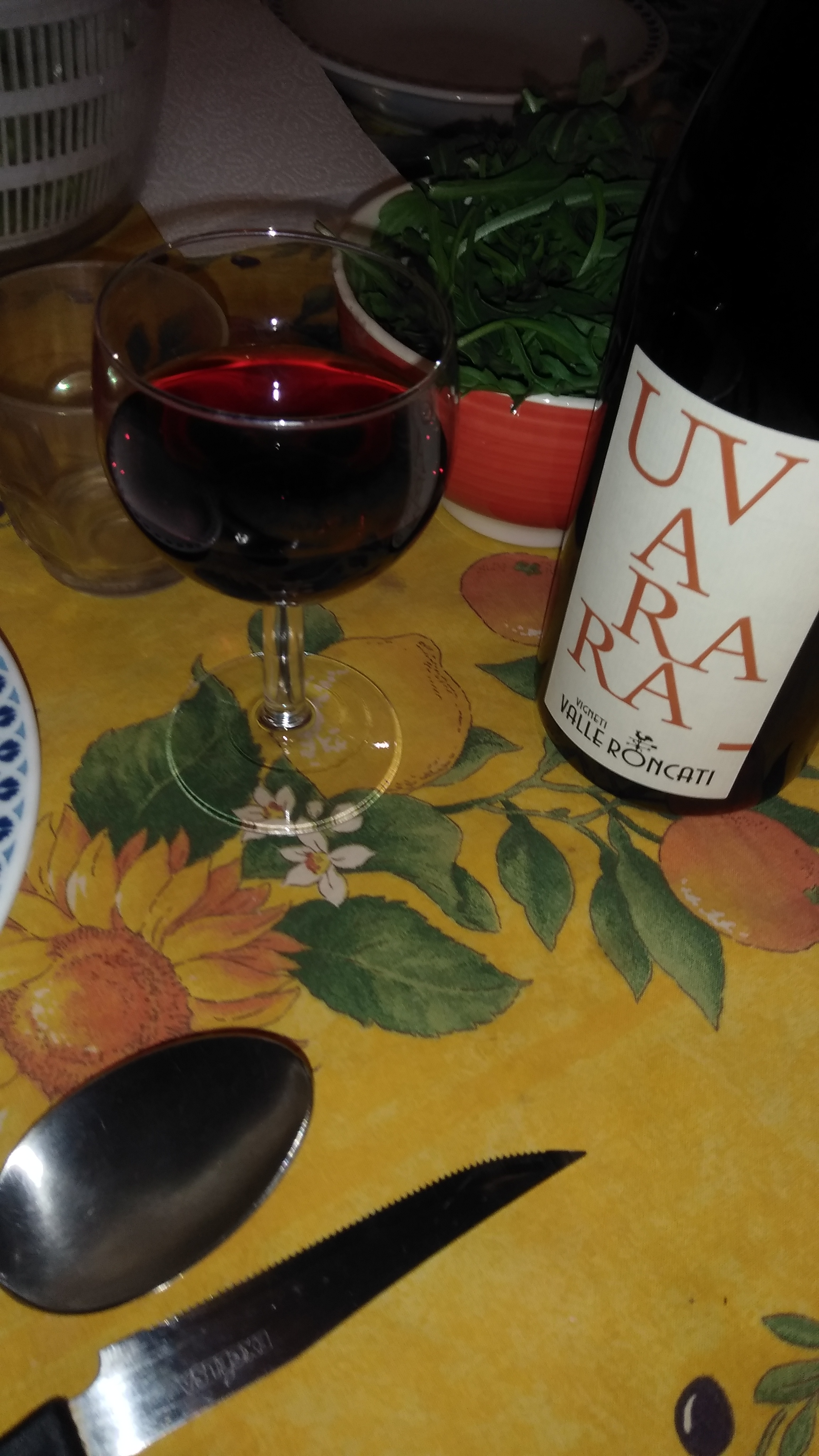 Un bicchiere di "Colline Novaresi Uva Rara" DOC - annata 2016